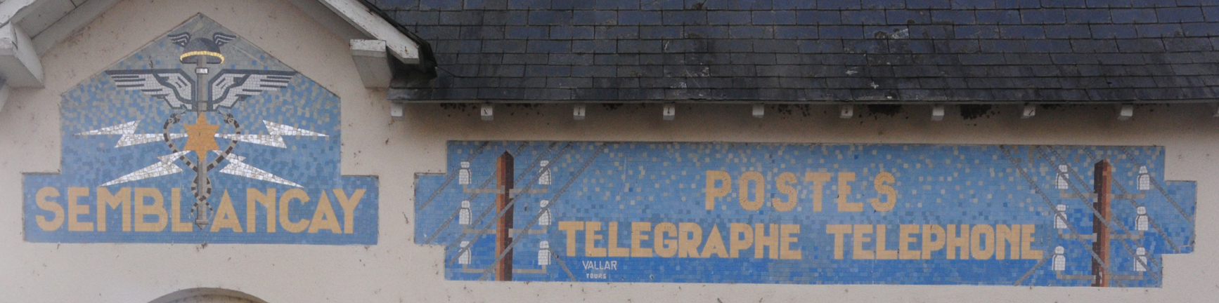 Sante Vallar (Français d'origine italienne, 1893-1951) : mosaïque figurative avec inscription POSTES TELEGRAPHE TELEPHONE, signée VALLAR Tours, zoom sur un détail de la façade du bureau de poste de Semblancay, Indre et Loire, Centre-Val-de-Loire, France.